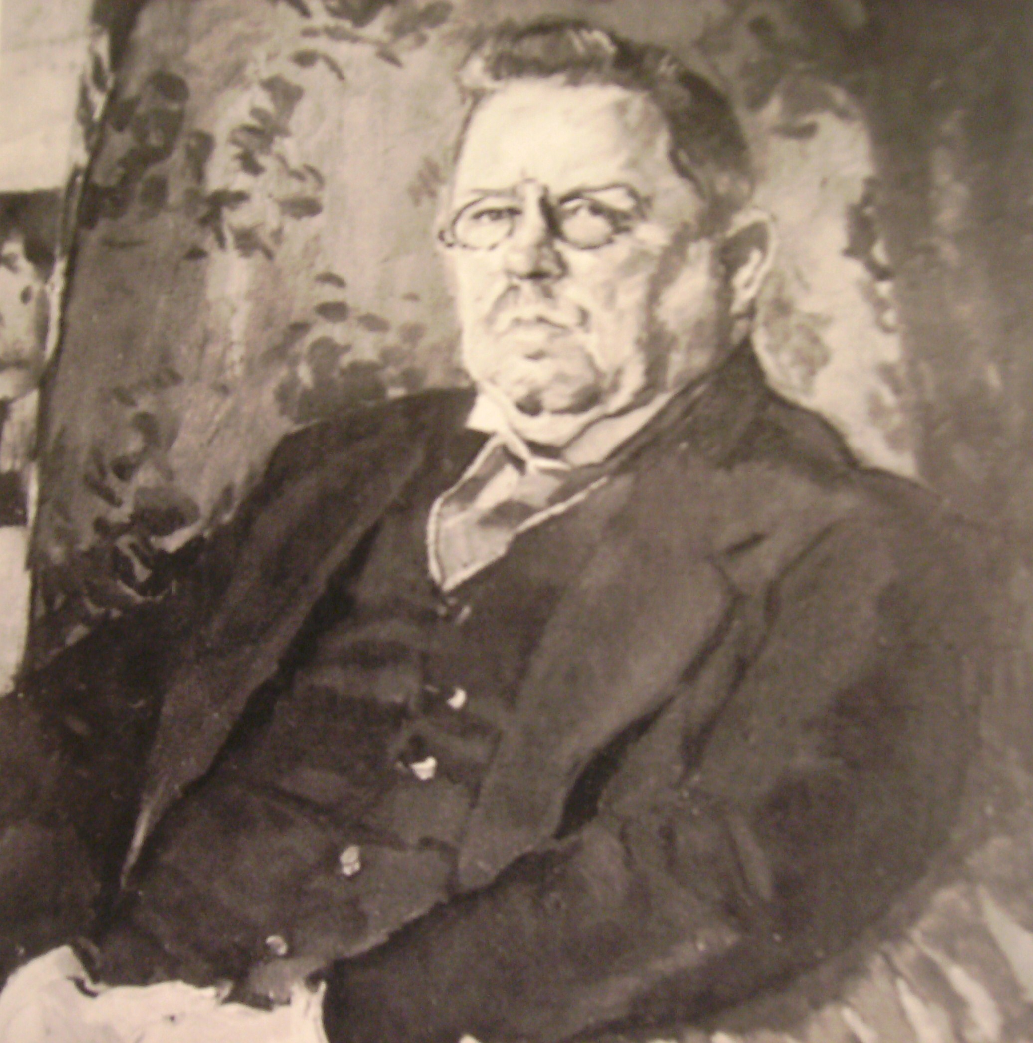 Portrait Max Halbe. Portraitgemälde von Albert Weisgerber (1909)